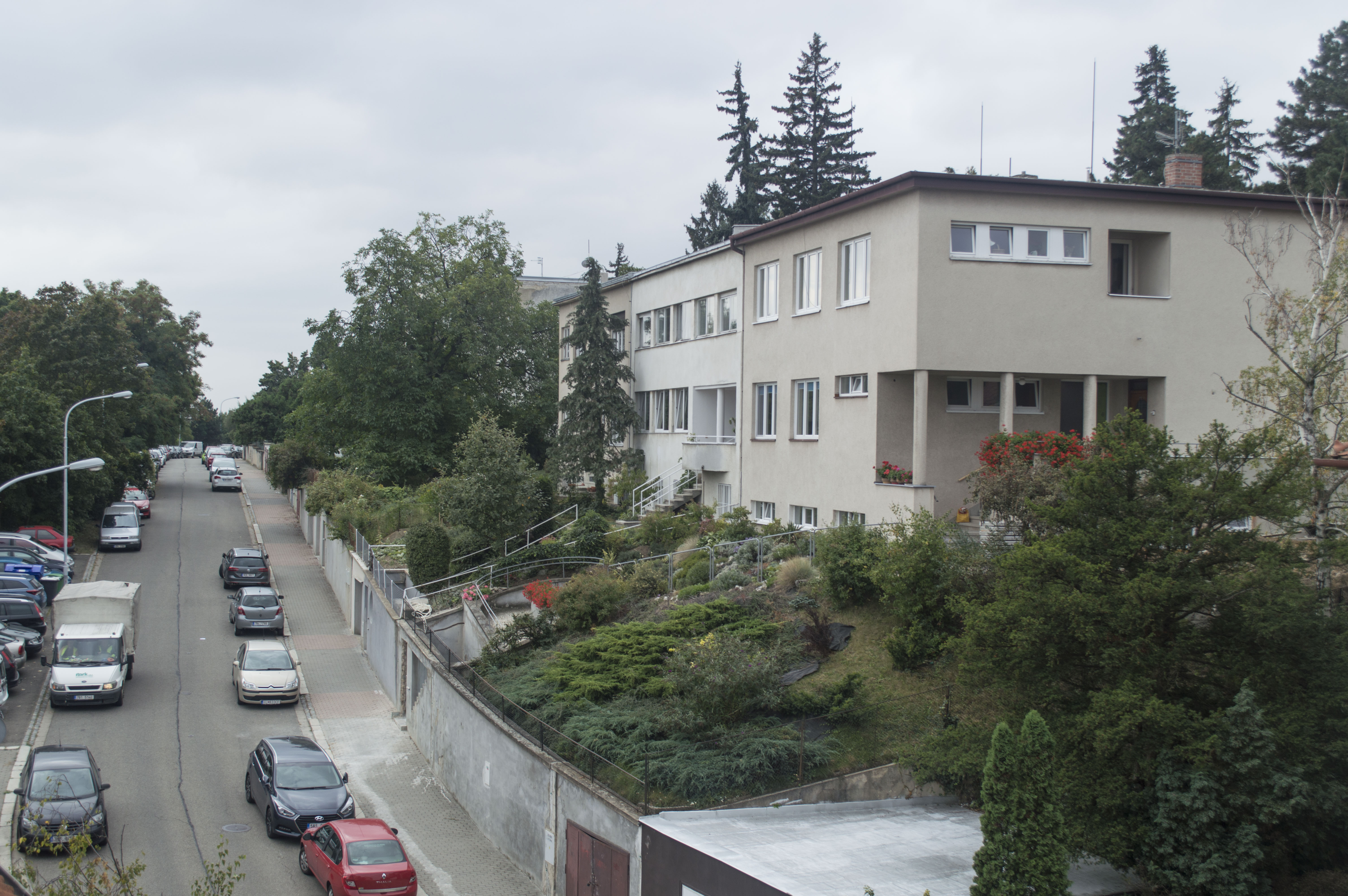 Pohled na Kyselkův dům. Foceno z domu na ulici Tomešova.